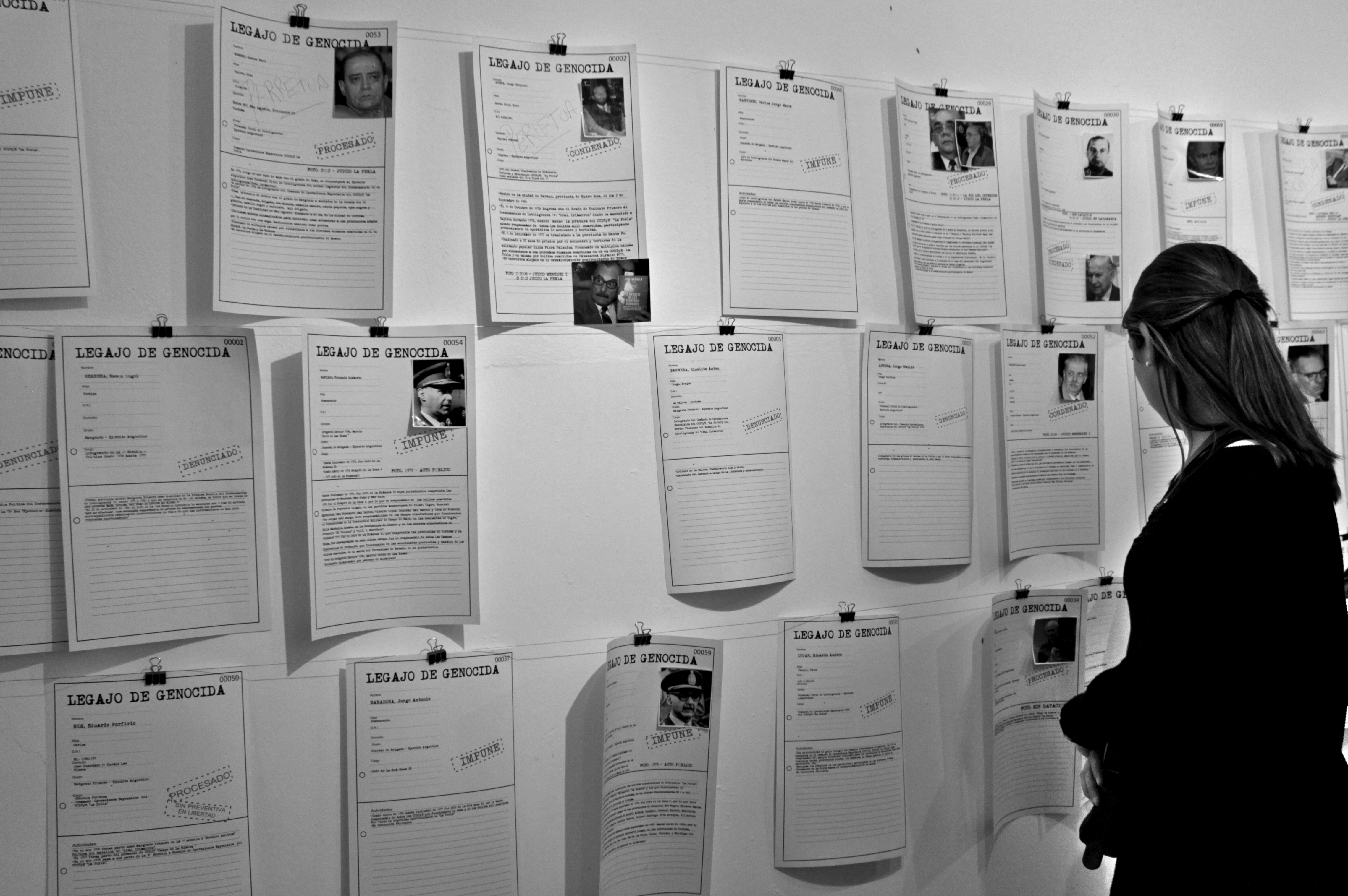 Espacio Para La Memoria La Perla